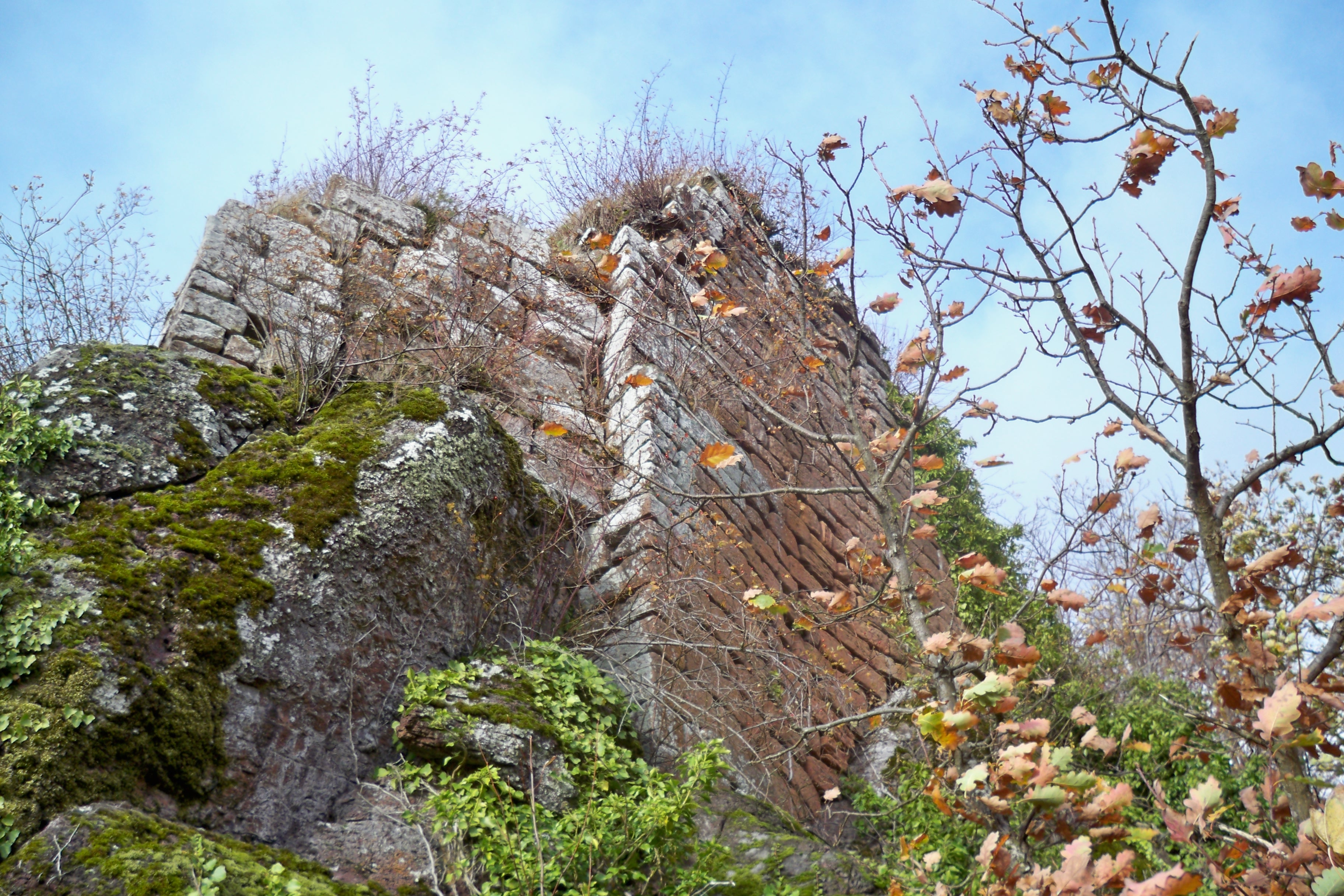 vue des ruines du château de Hohenstein, à Oberhaslach